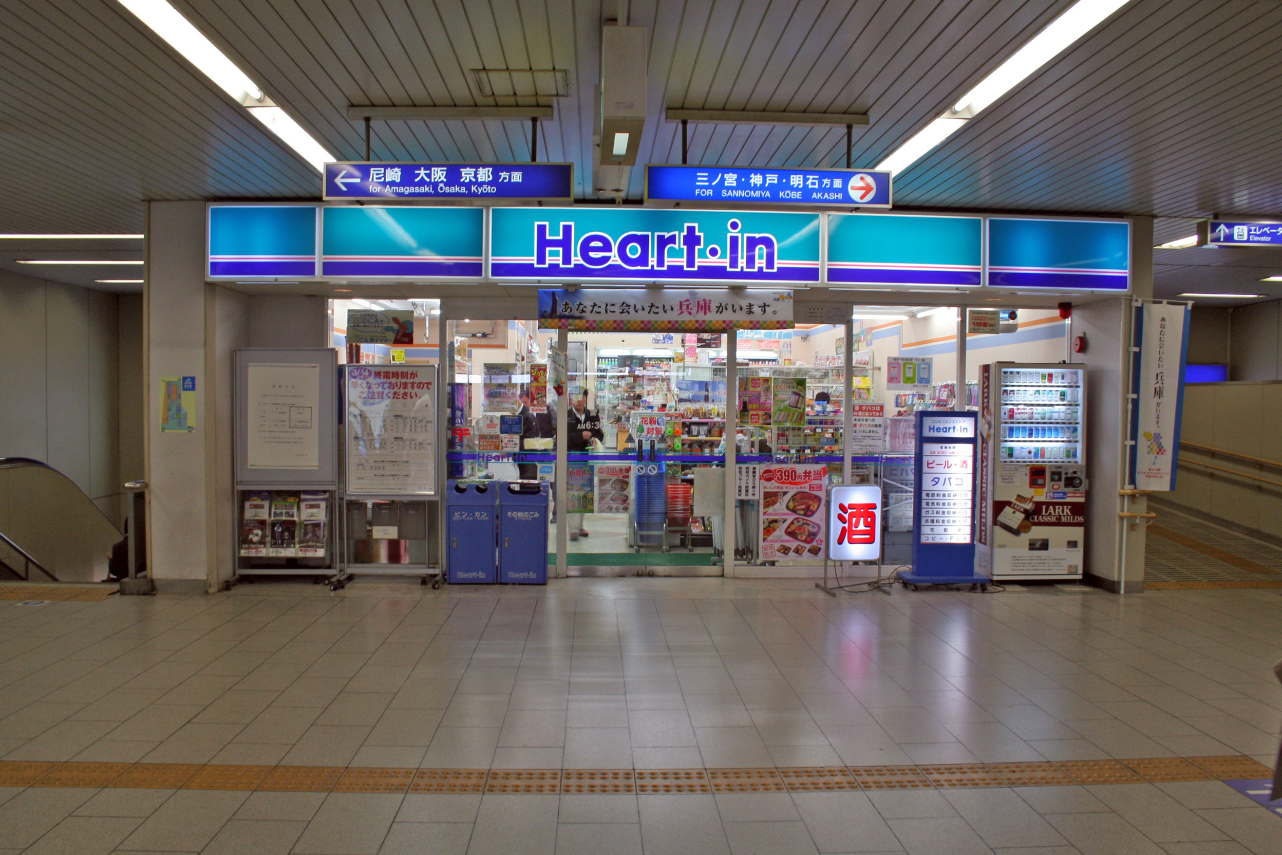 兵庫県神戸市にあるJR西日本の駅。住吉駅。 駅内にあるコンビニエンスストア。ハートイン。